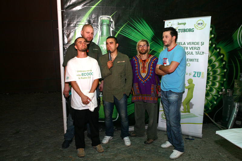 In ultima zi de campanie Umbrela Verde la Constanta, trupa Sistem a concertat in parcarea de la City Park Mall.